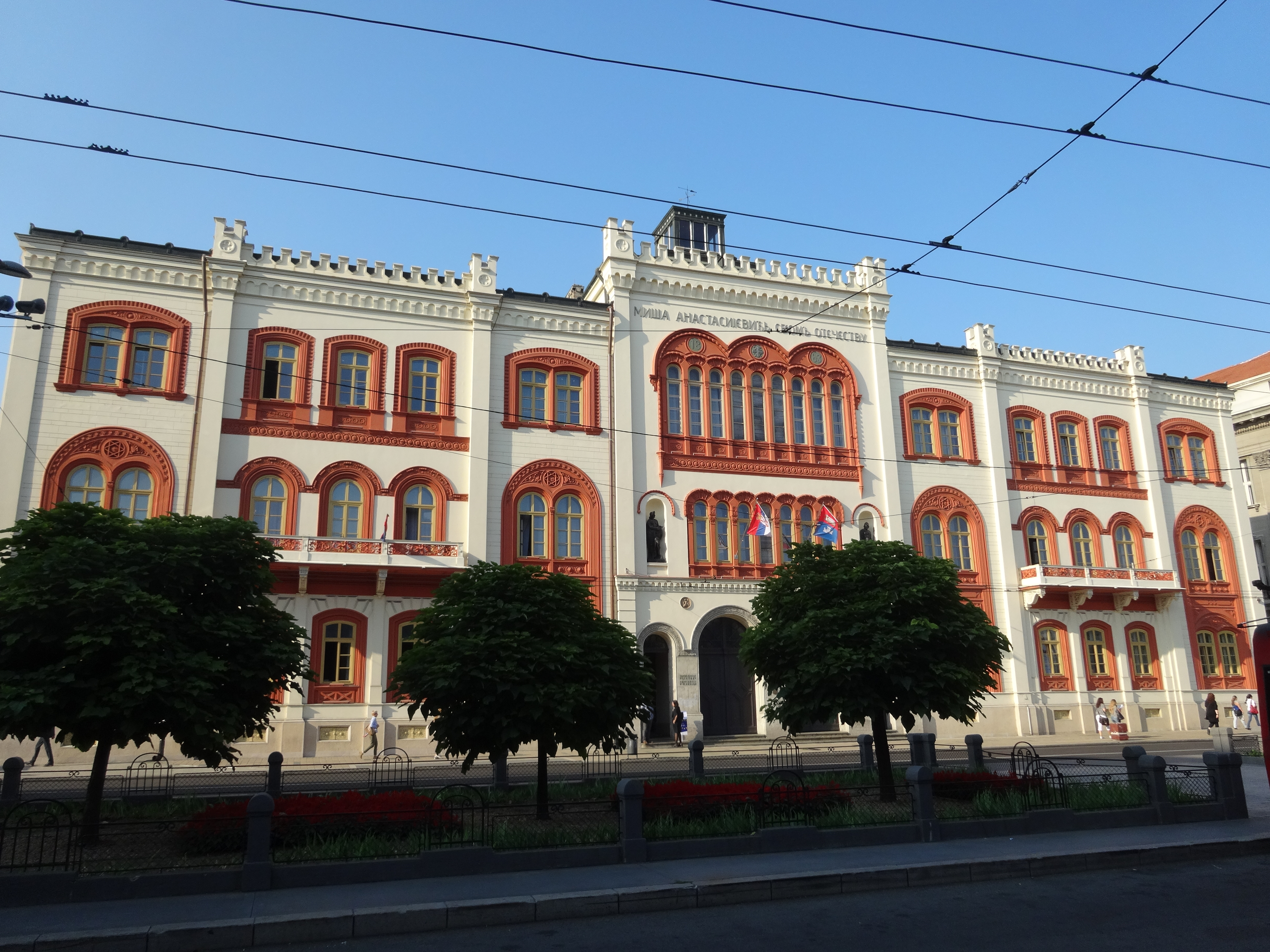 Kapetan Mišino zdanje u Beogradu